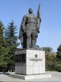 Паметник на Съветската армия в Русе.